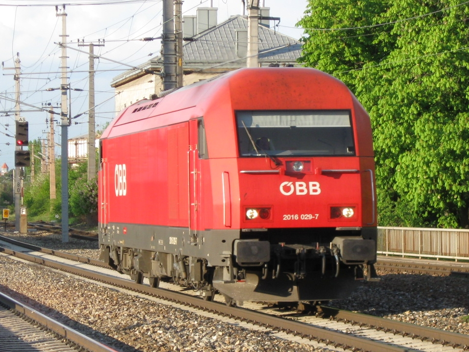 ÖBB Baureihe 2016 in Wien-Atzgersdorf, 2009